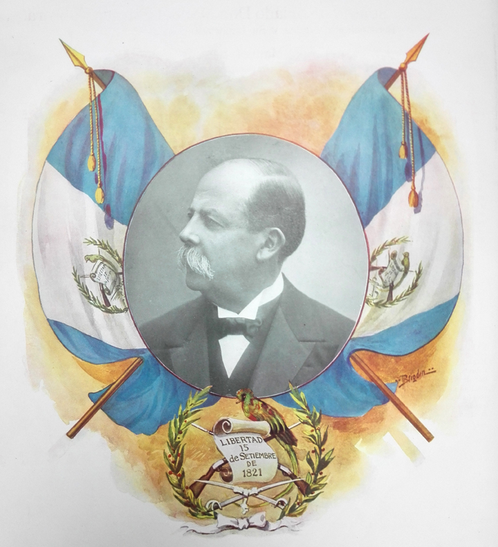 Libro Azul de Manuel Estrada Cabrera